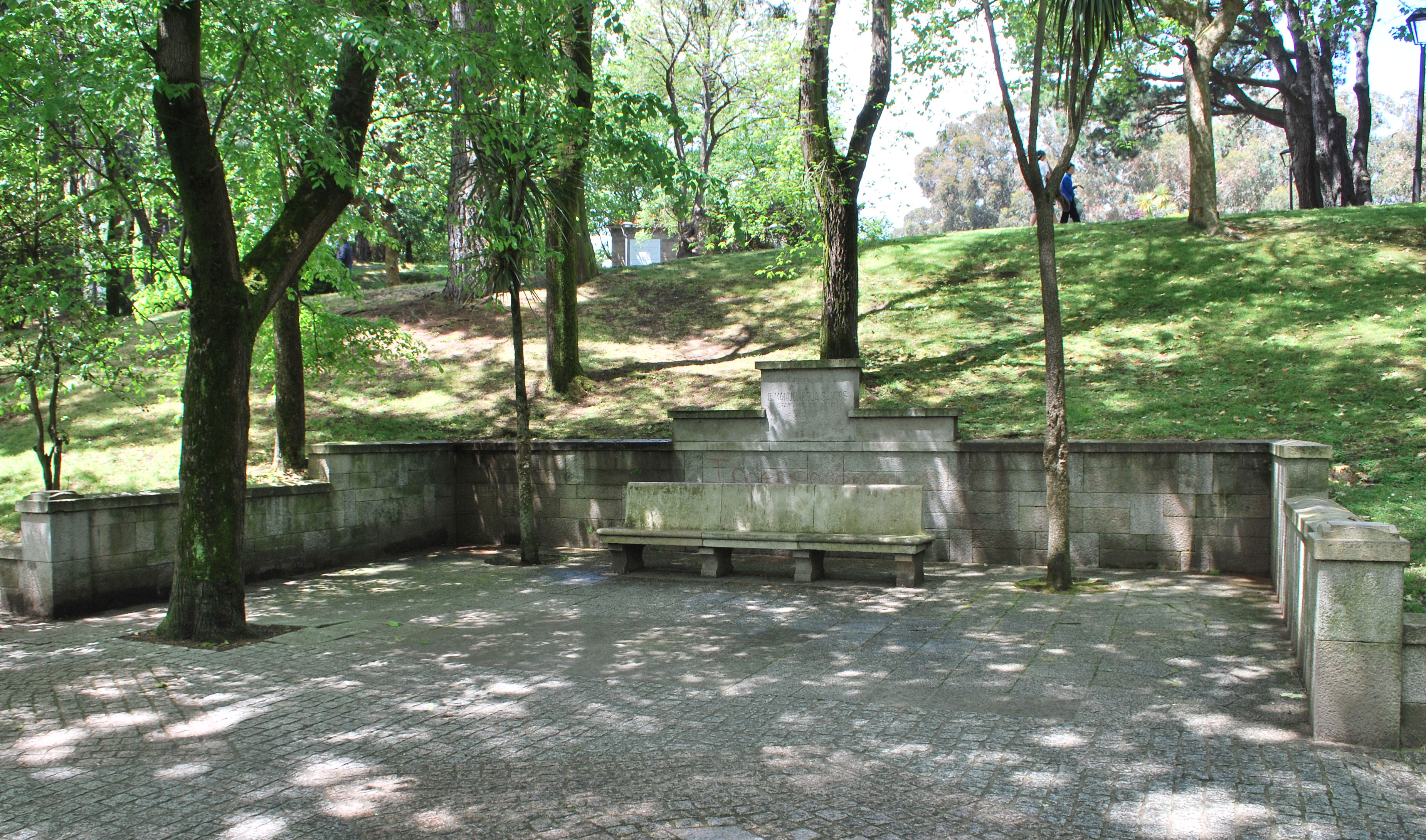 Homenaxe a Manuel Insua Santos no parque de Santa Margarida A Coruña Galiza Spain